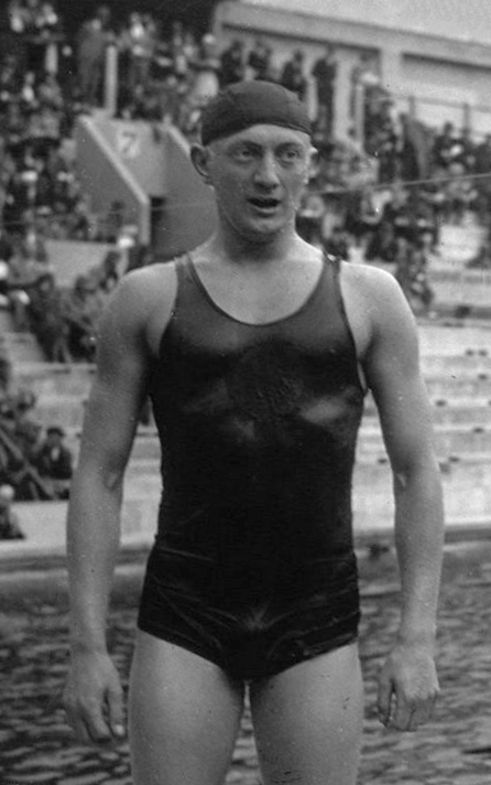 Les Tourelles : Championnats d'Europe : Siestas (allemand) (portrait à 3 m) : [photographie de presse] / Agence Meurisse